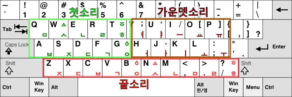 안마태 소리 글판(안마태 자판)의 첫소리/가운뎃소리/끝소리 배열 짜임새